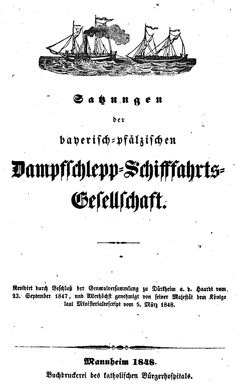 Satzung der Bayerisch-Pfälzischen Dampf-Schlepp-Schifffahrts-Gesellschaft, 1848